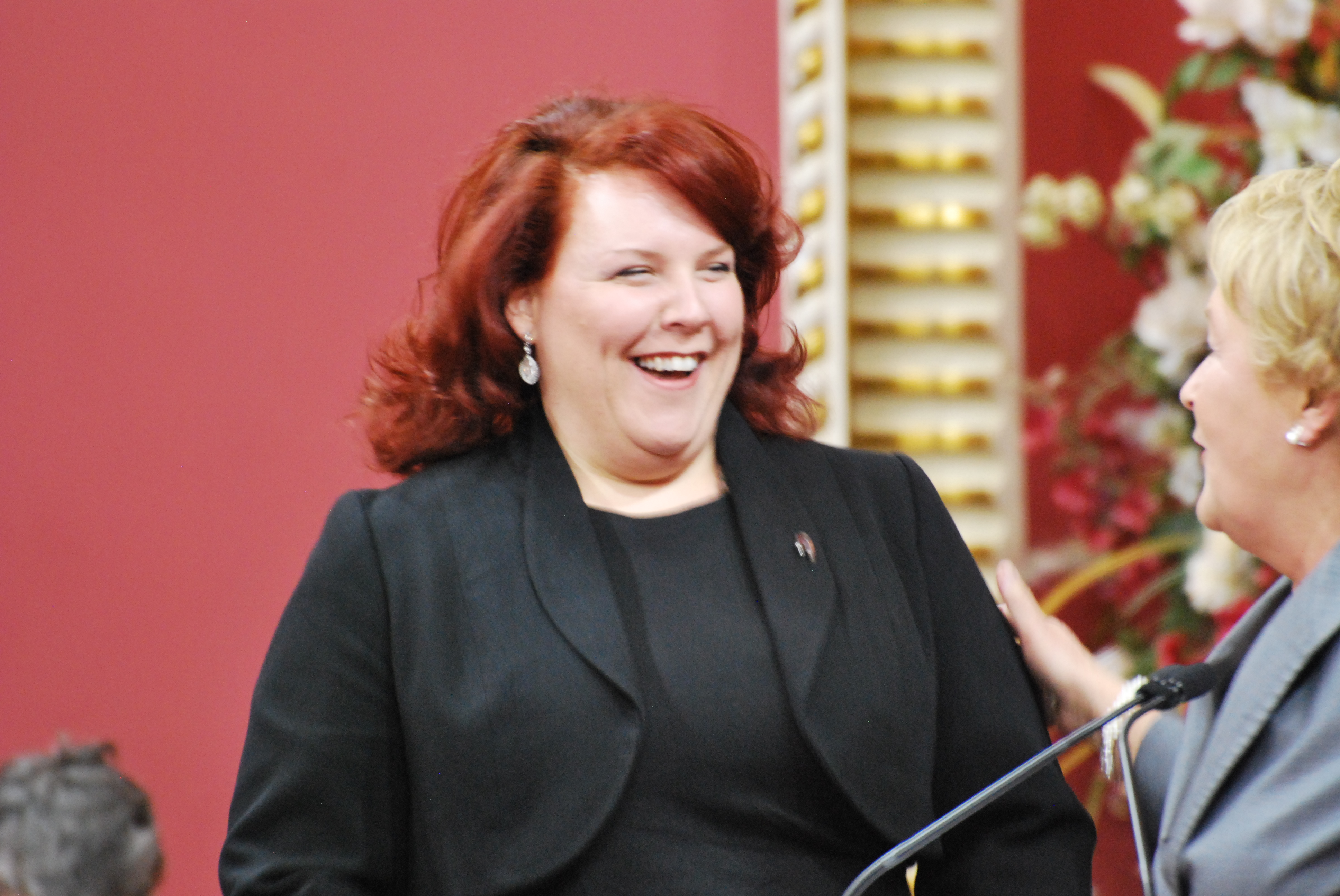 Cérémonie de remise de l'ordre national du Québec 2013. Marie-Nicole Lemieux et Pauline Marois